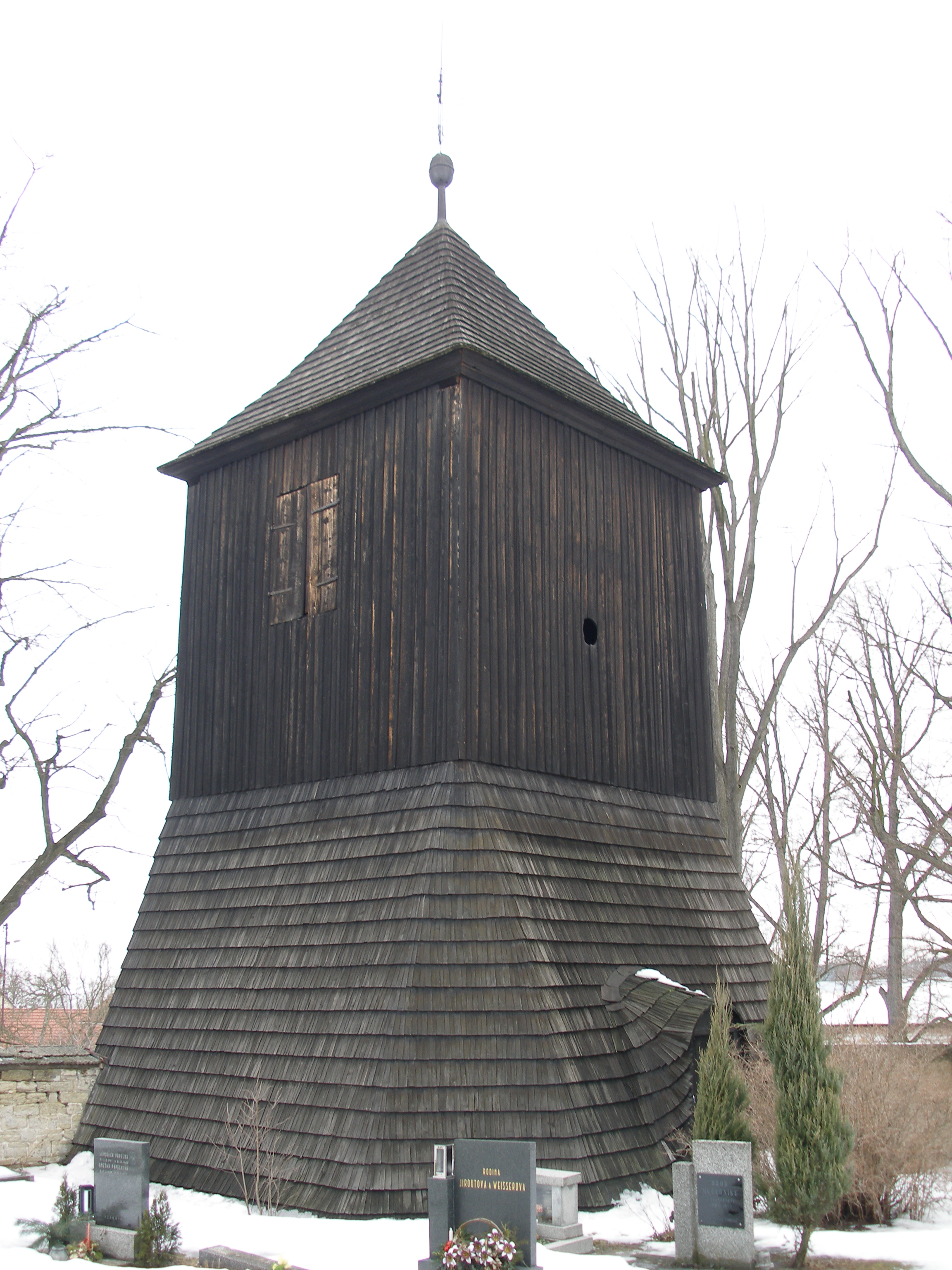 Dřevěná zvonice kostela sv. Jiřího v Radhošti, okres Ústí nad Orlicí.